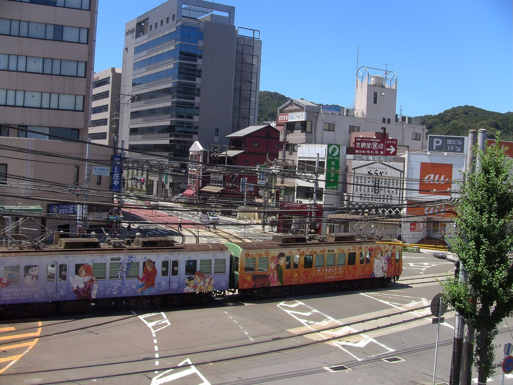 京阪浜大津駅から発進する、ちはやふるラッピング電車